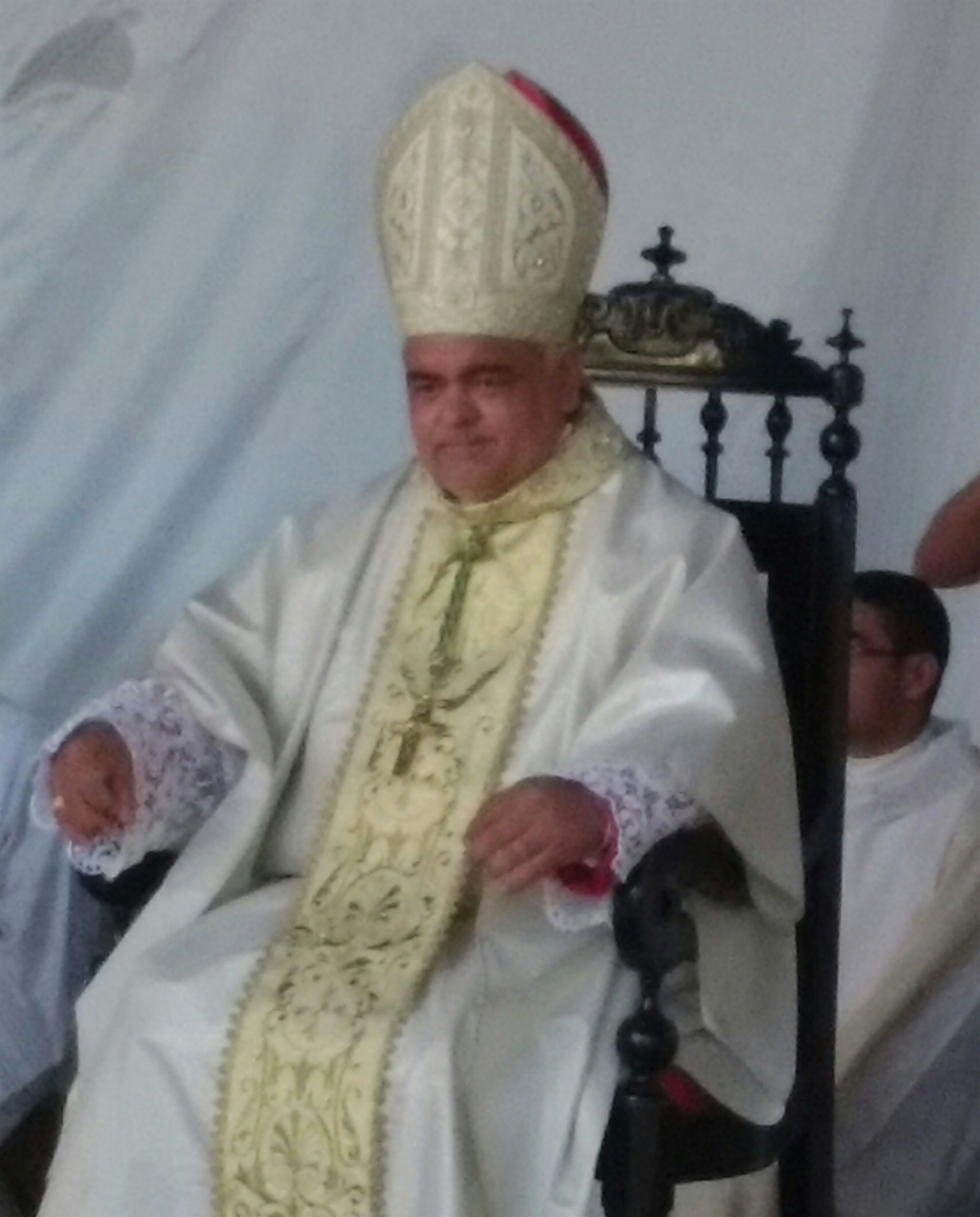 Momento da posse do nono bispo diocesano de Caetité, Bahia, Brasil, Dom Carvalho.